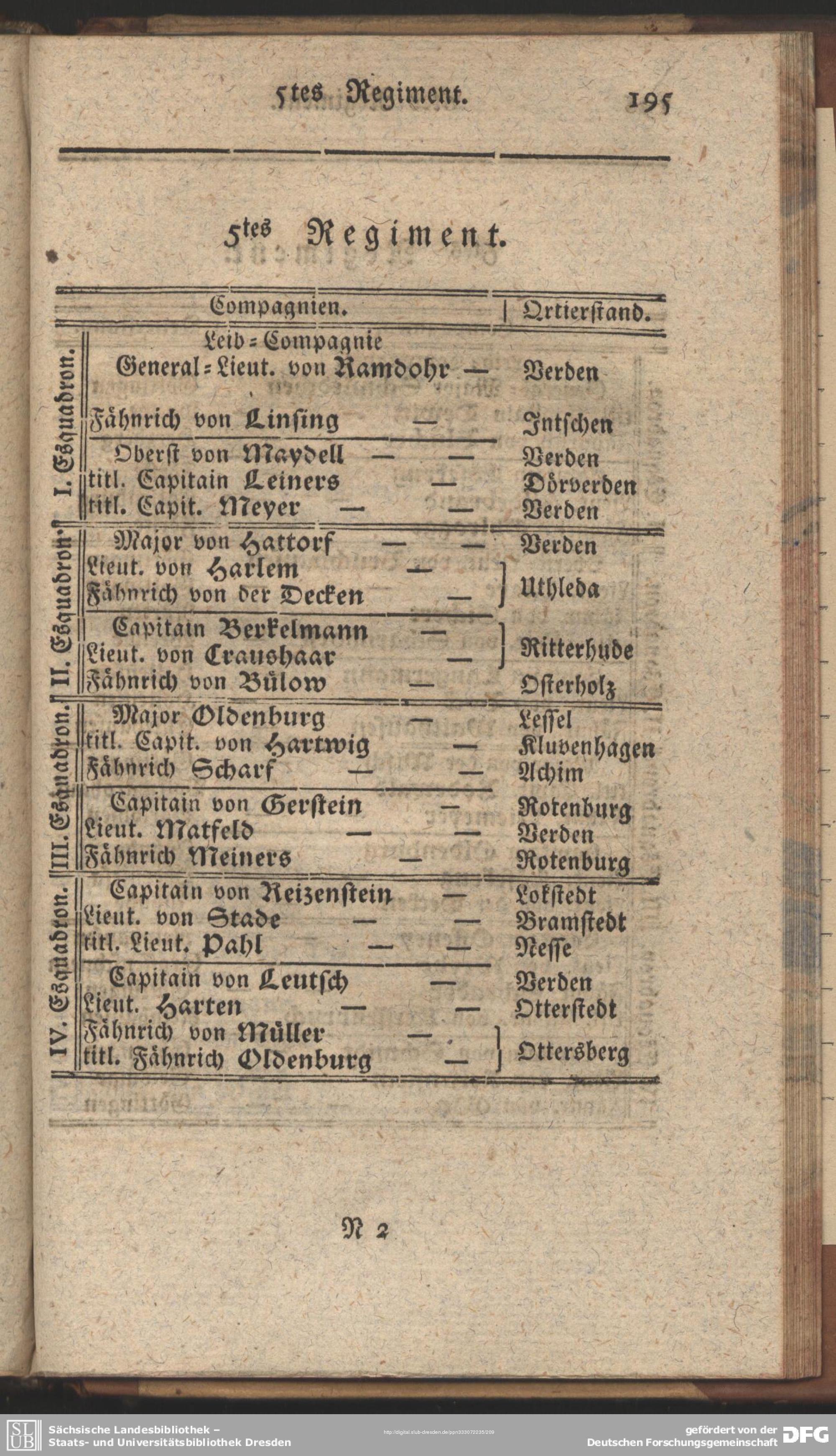 Garnison 5. hannov. DragRgt 1791